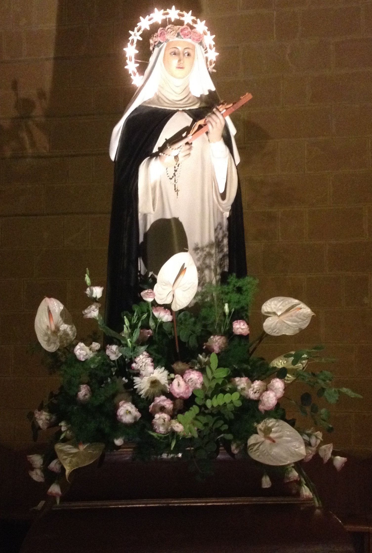 Statua di Santa Rosa da Lima dell'omonima parrocchia di Lecce.